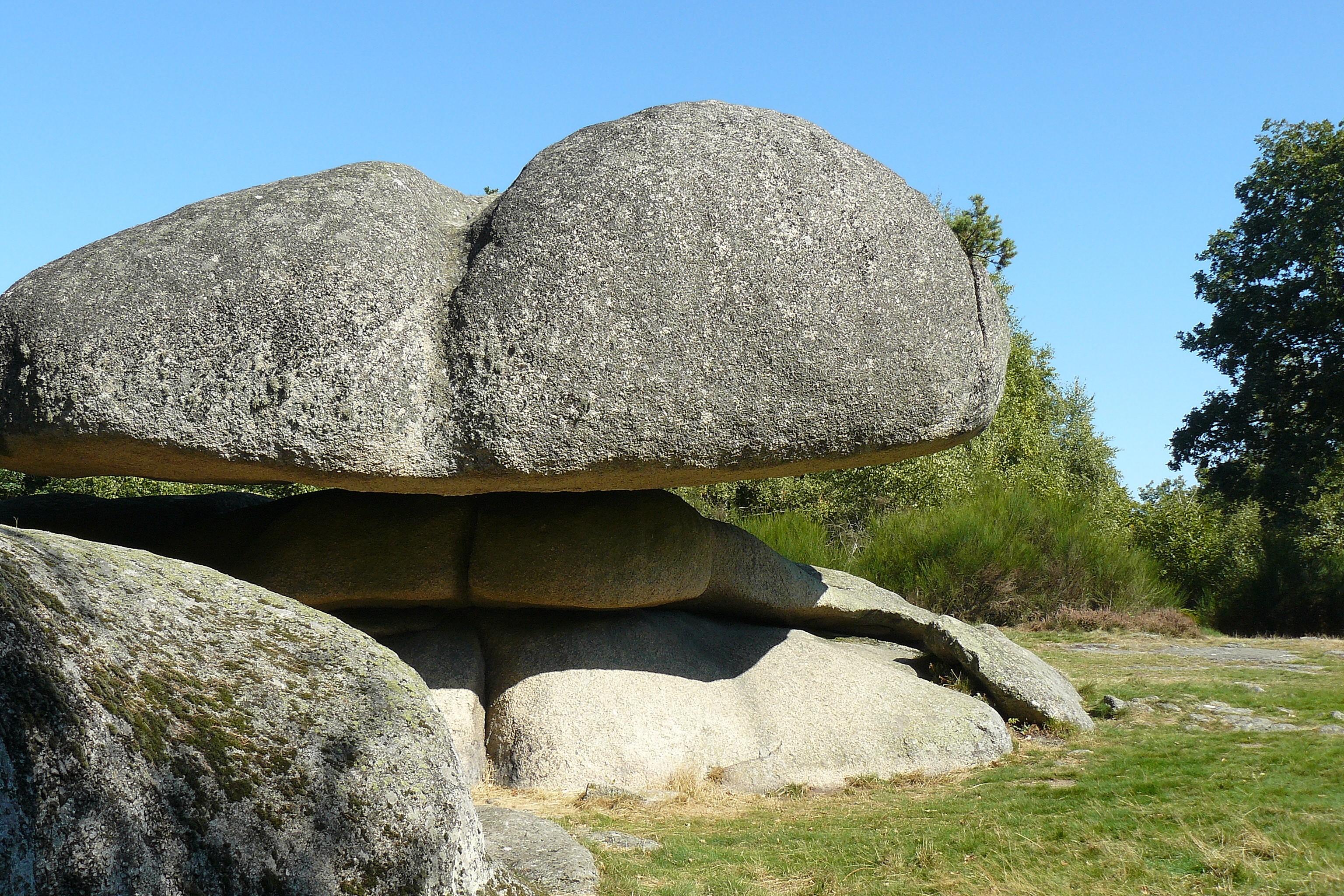 Les Pierres Jaumâtres à Toulx-Sainte-Croix (Creuse, France)